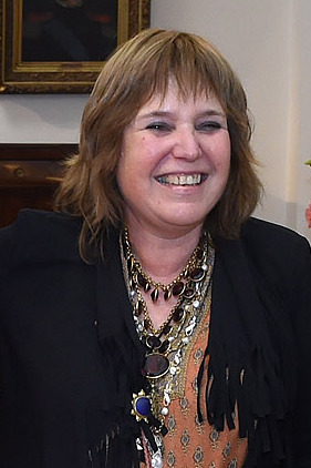 La pintora francesa Federica Matta